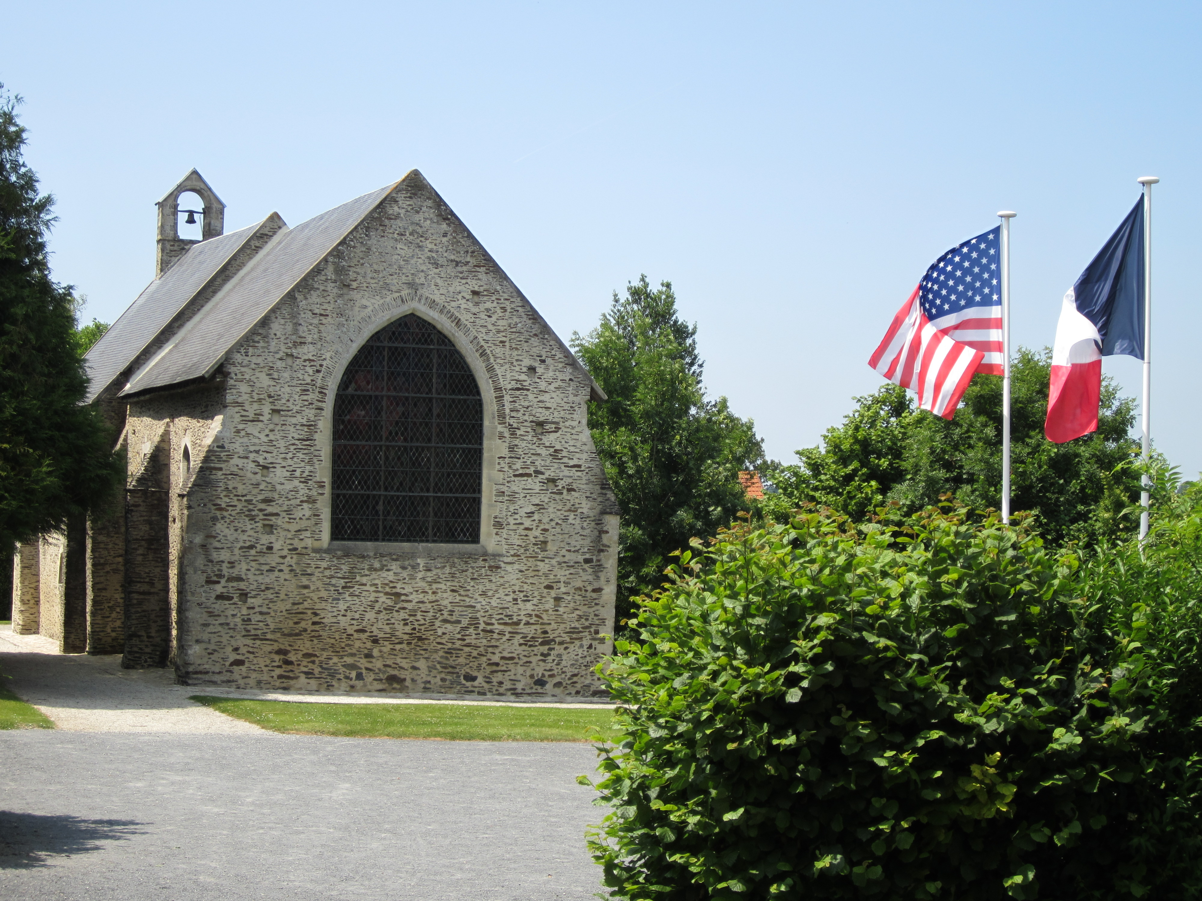 Chapelle de la Madeleine;Saint-Lô, Mémorial US .